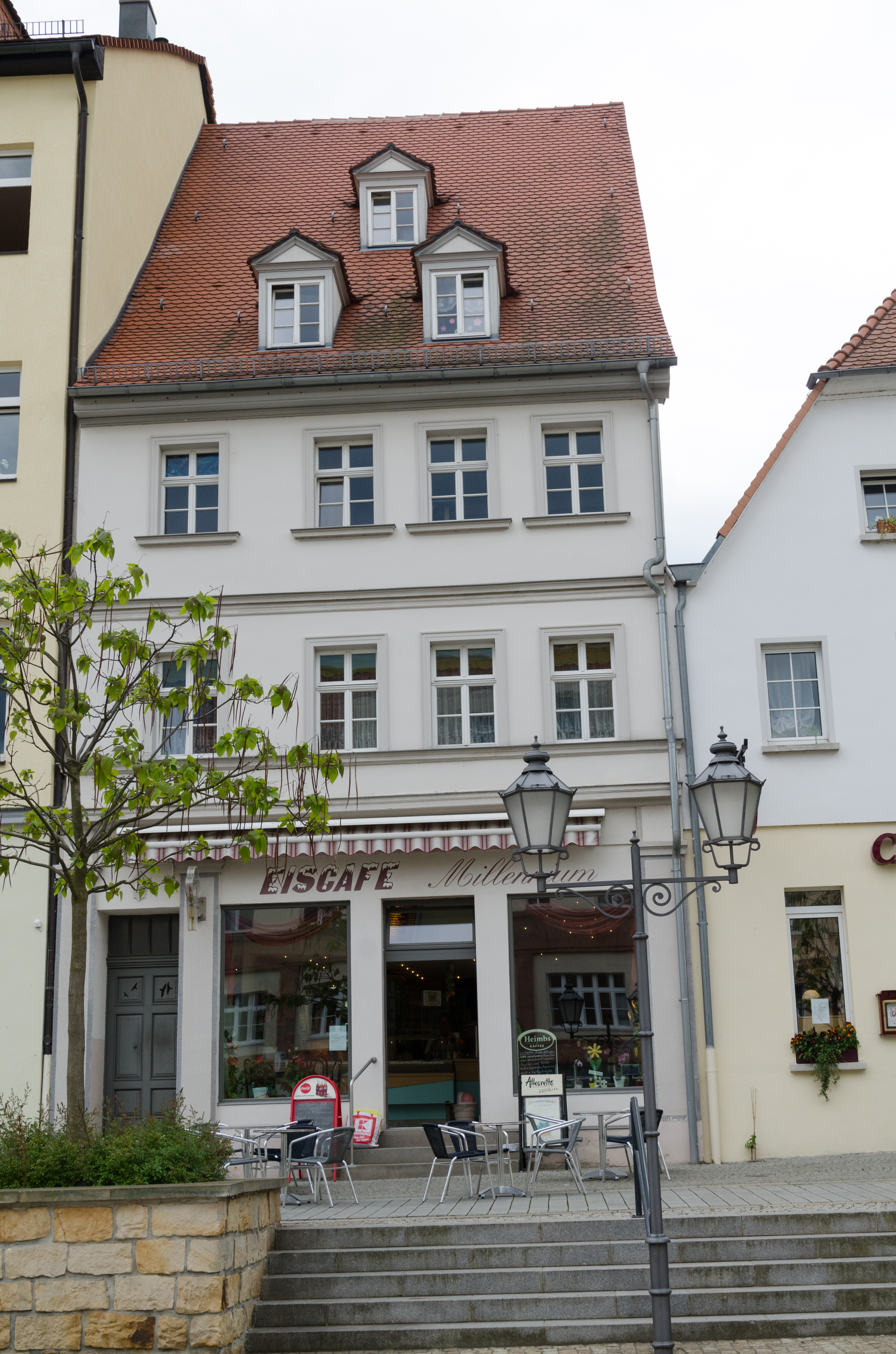 Zeitz, Neumarkt 6